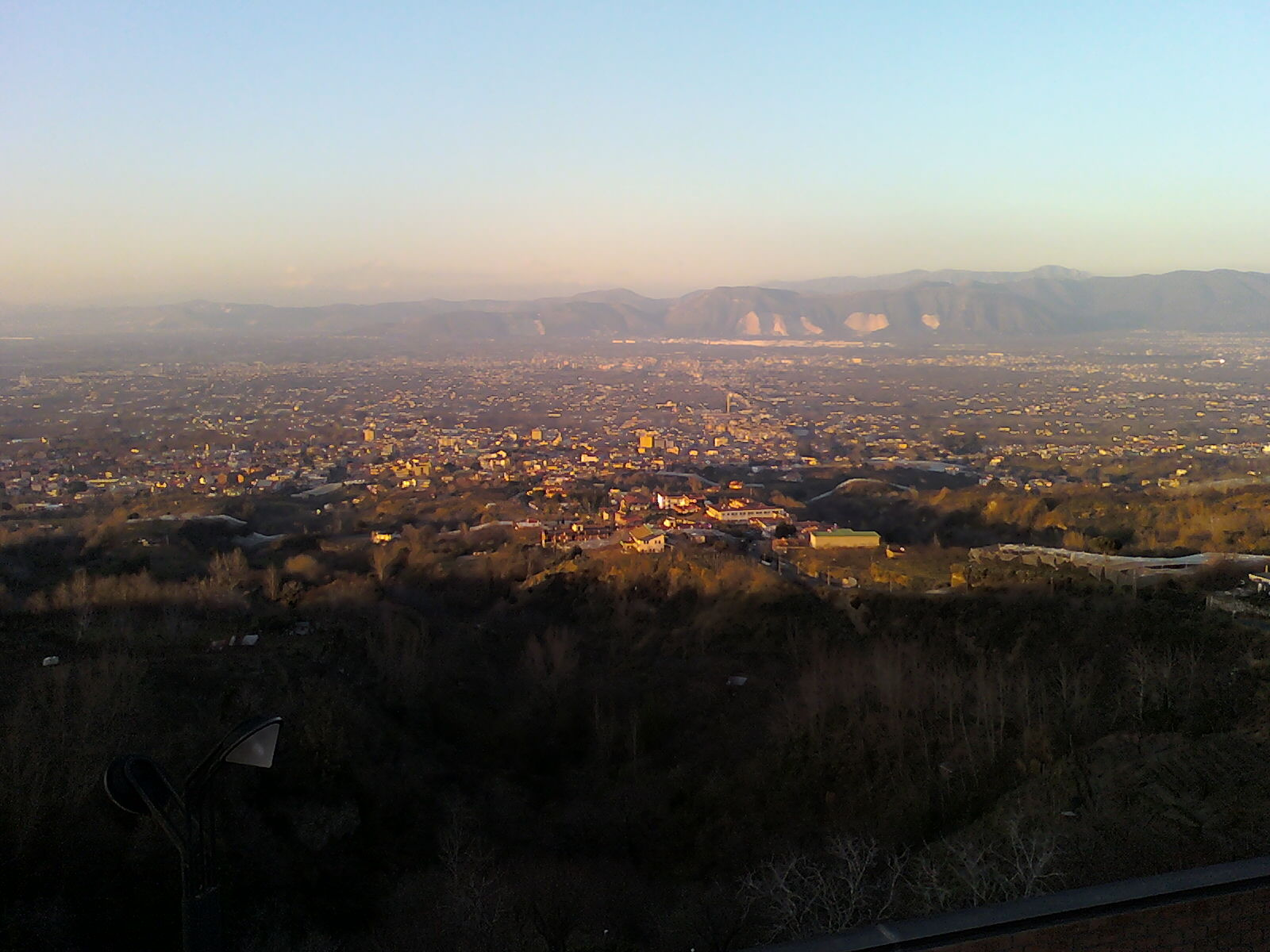 Panorama di Somma Vesuviana.